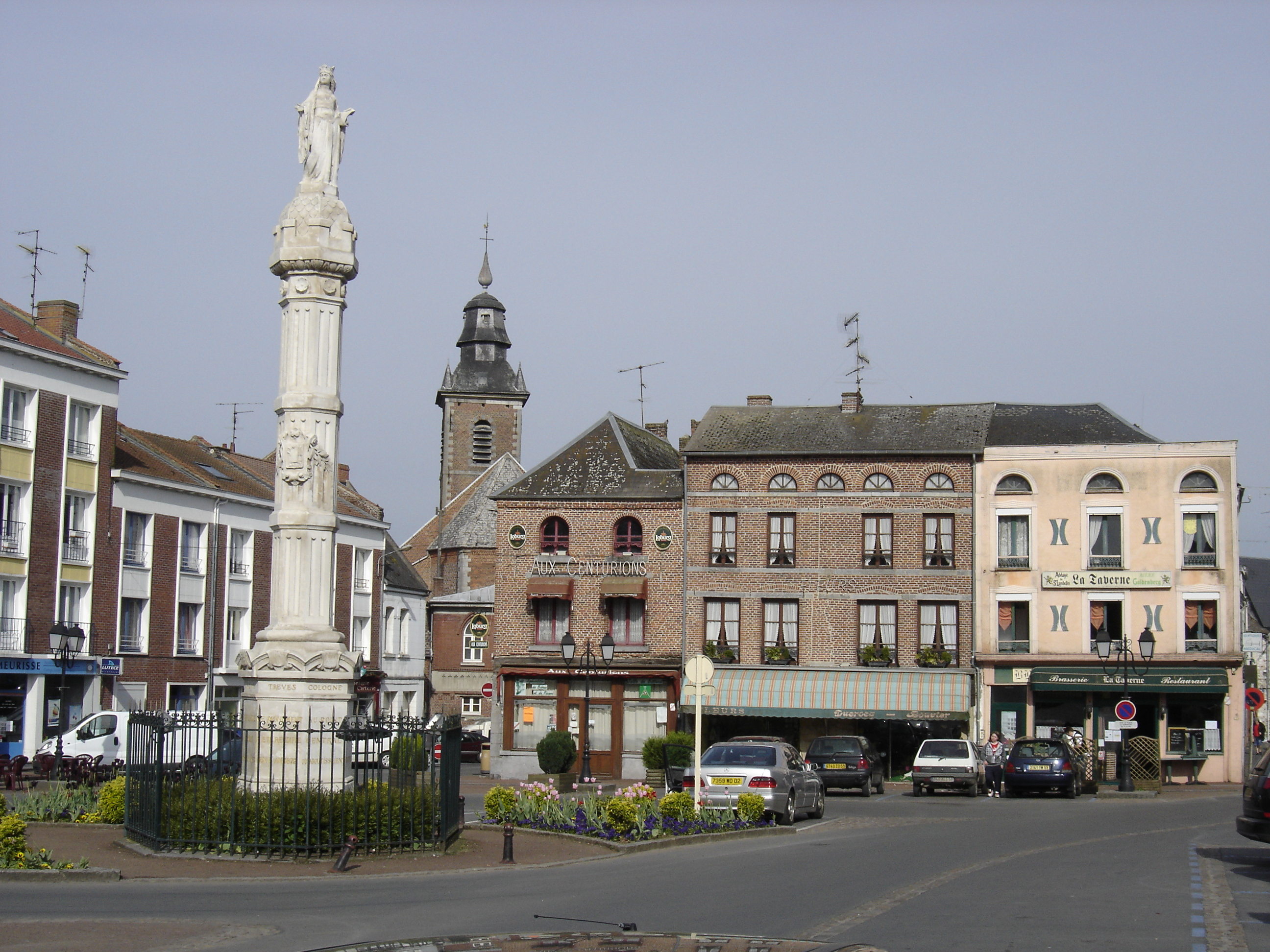 Bavay Place Charles-de-Gaulle